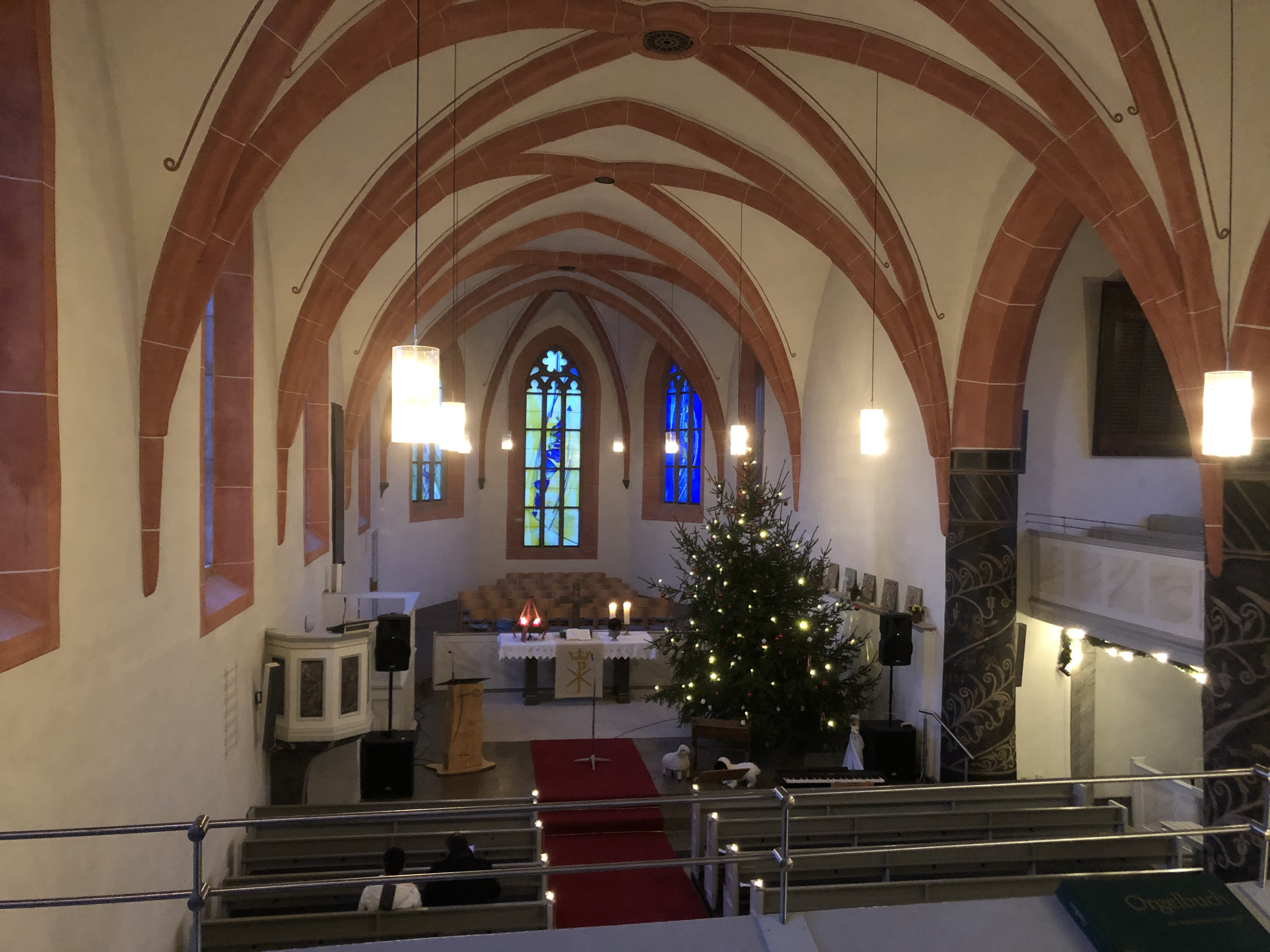 Mittelschiff der Stadtkirche Sontra